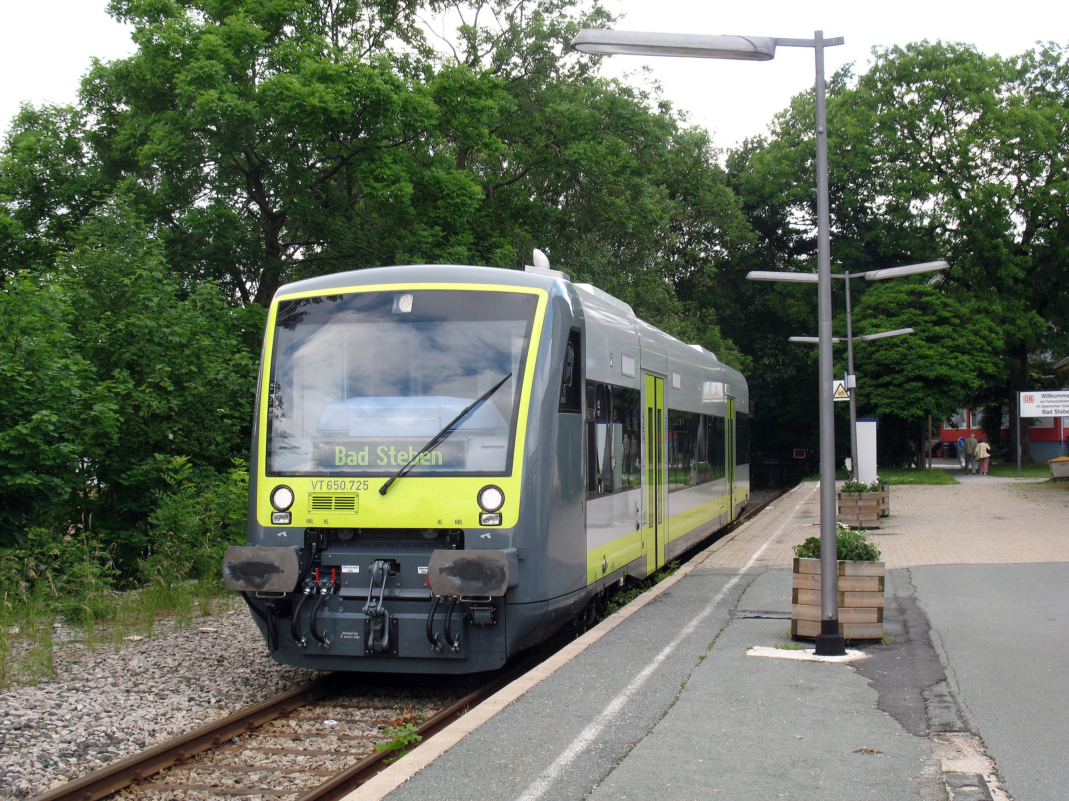 Agilis VT 650.725 am 21.06.2011 abfahrbereit in Bad Steben. Die Zugzielanzeige zeigt noch "Bad Steben", sie muss noch umgestellt werden auf den neuen Zielbahnhof. Dies wird wohl in den nächsten Minuten geschehen.